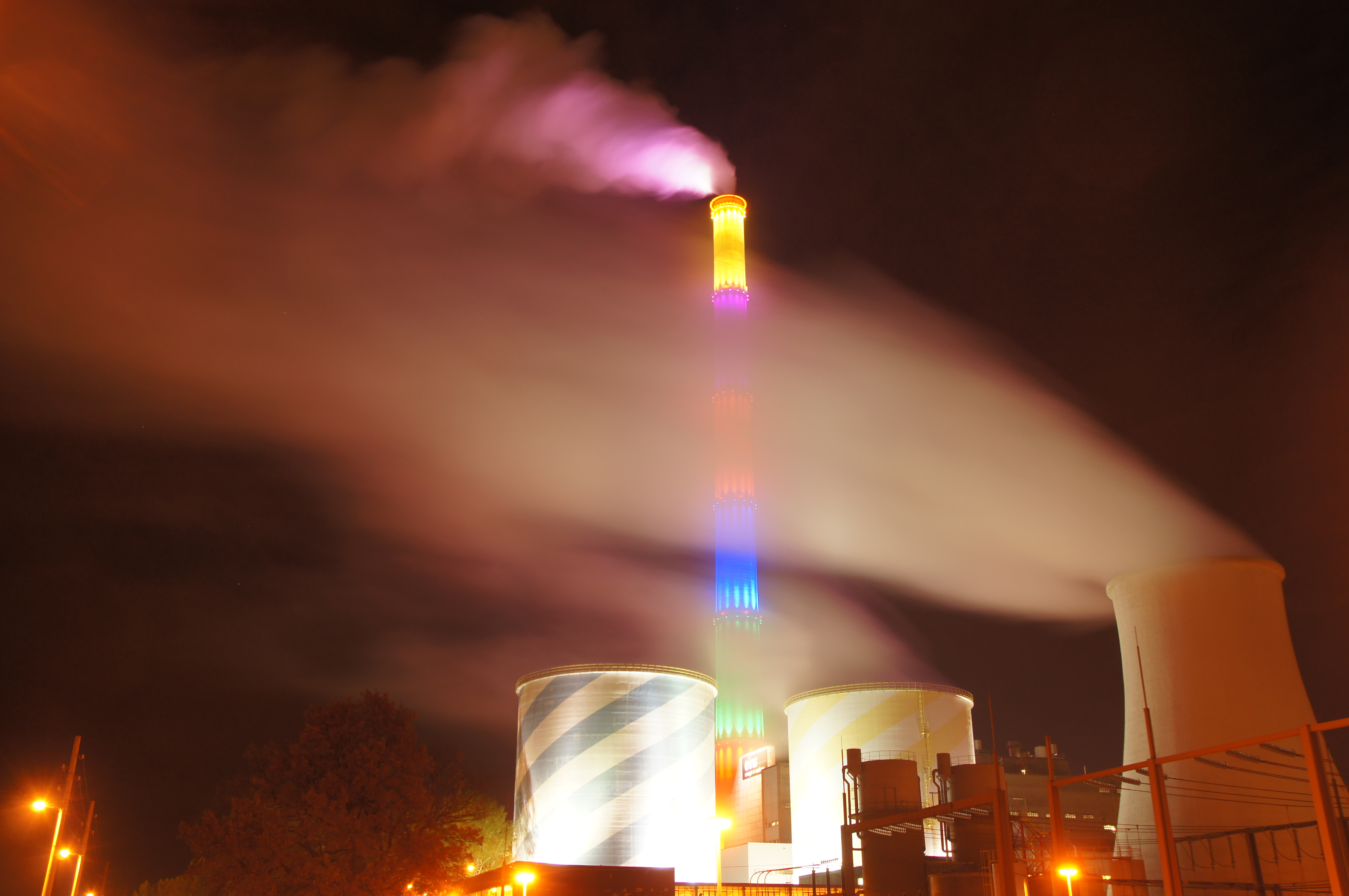 Heizkraftwerk Chemnitz-Nord bei Nacht